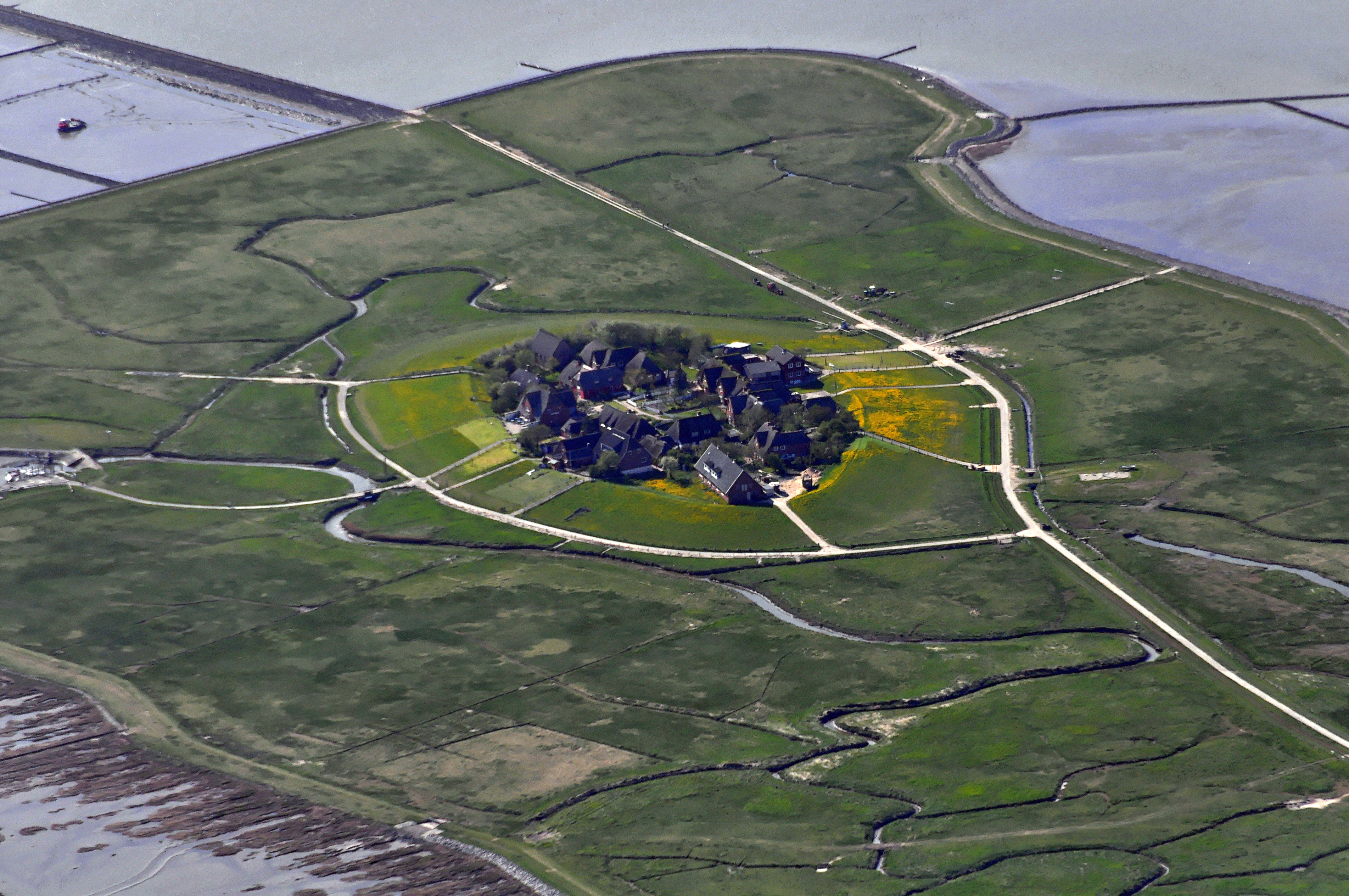 Luftbilder von der Nordseeküste 2012-05: Hallig Oland